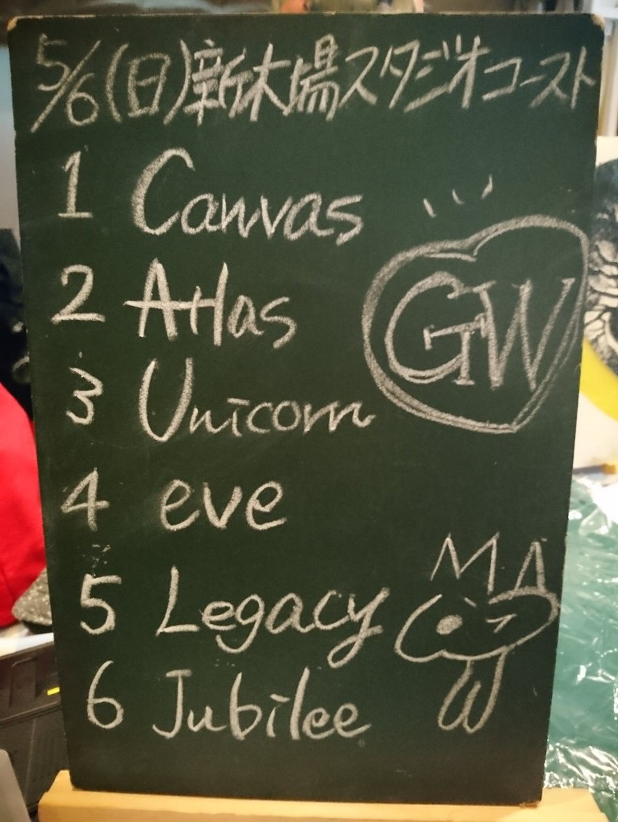 amiinAセトリボード(20180506(1))